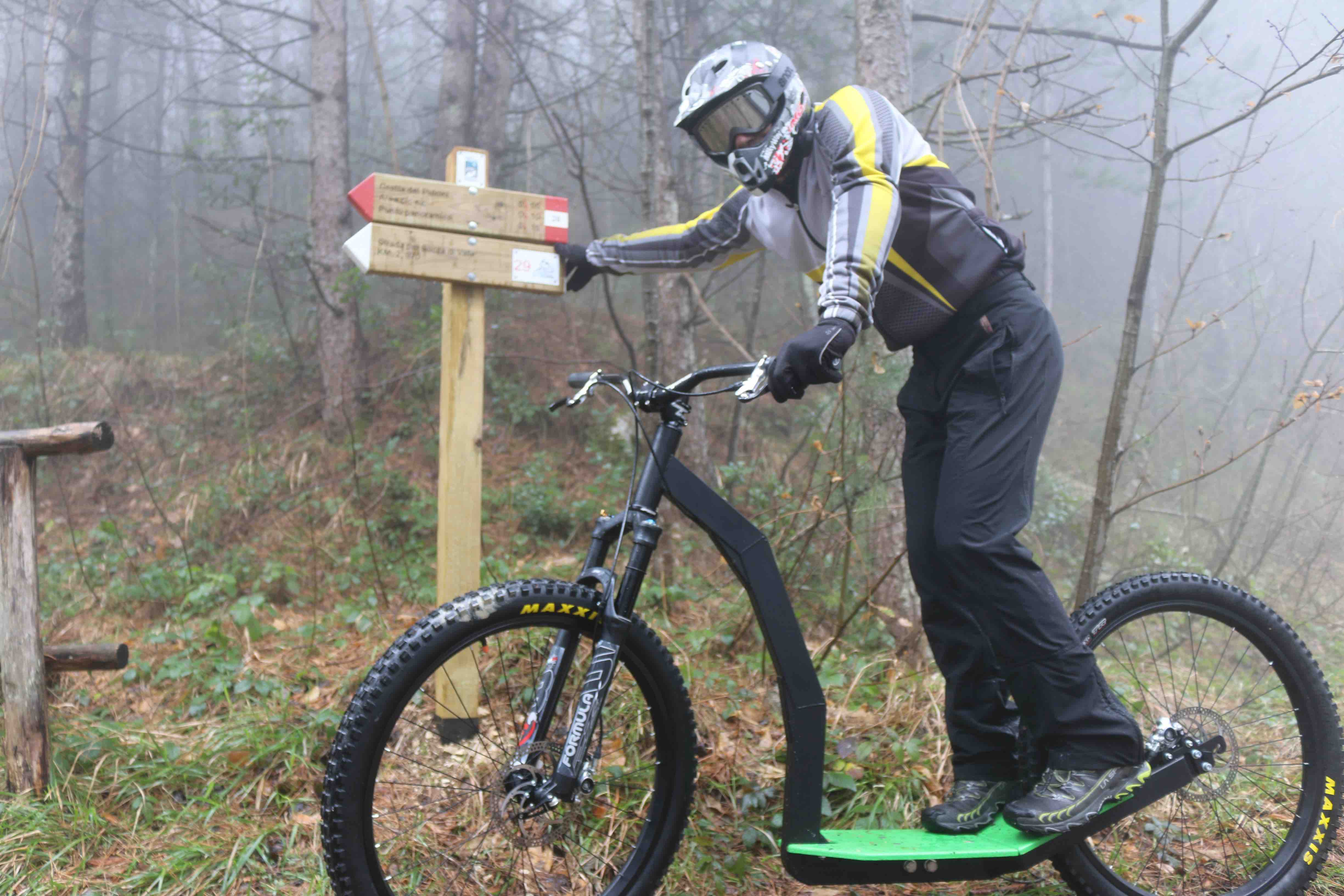 Le caratteristiche tecniche di un monopattino sportivo, rendono possibile un utilizzo intensivo su ogni tipo di terreno.